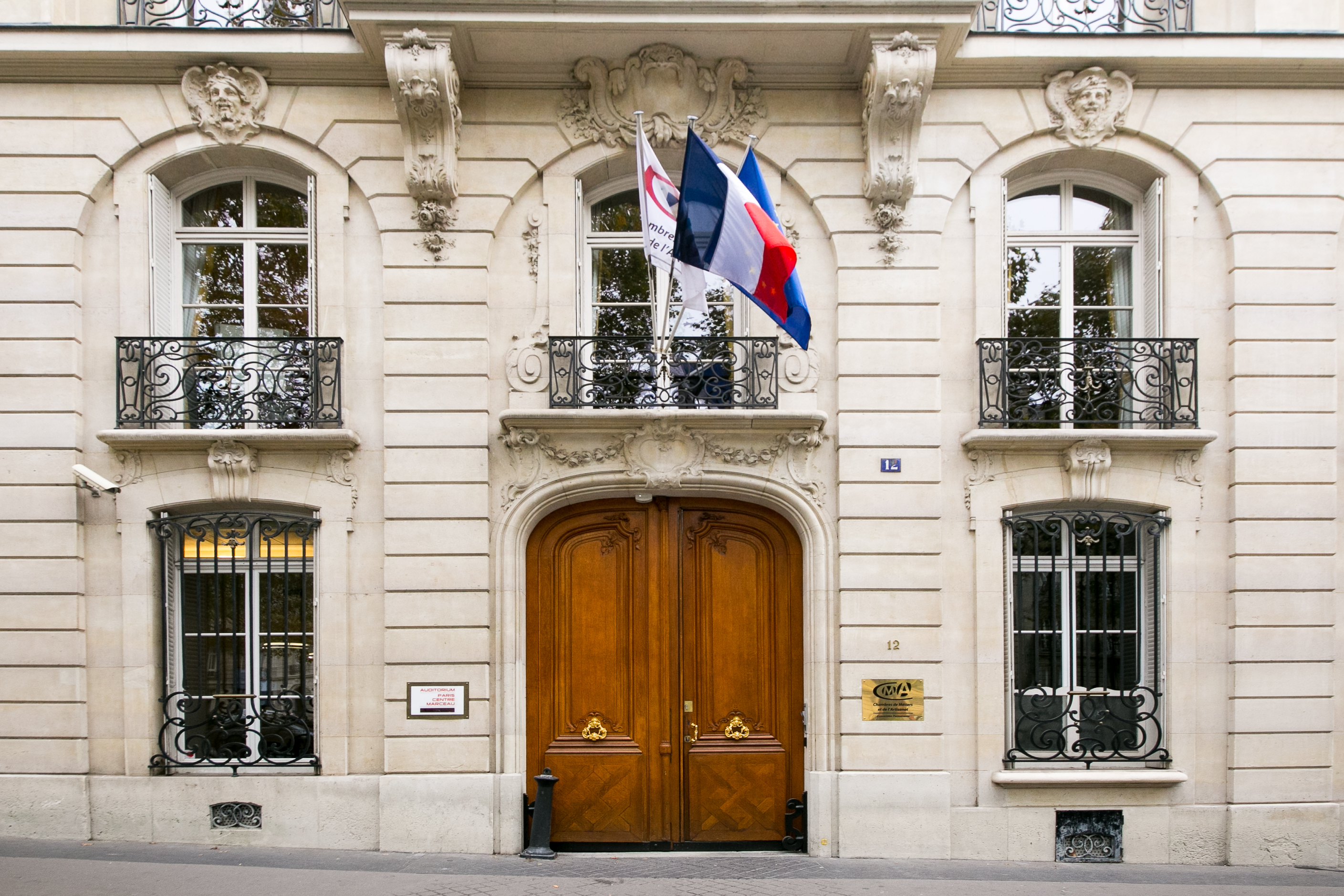 Assemblée permanente des chambres de métiers et de l'artisanat (APCMA)